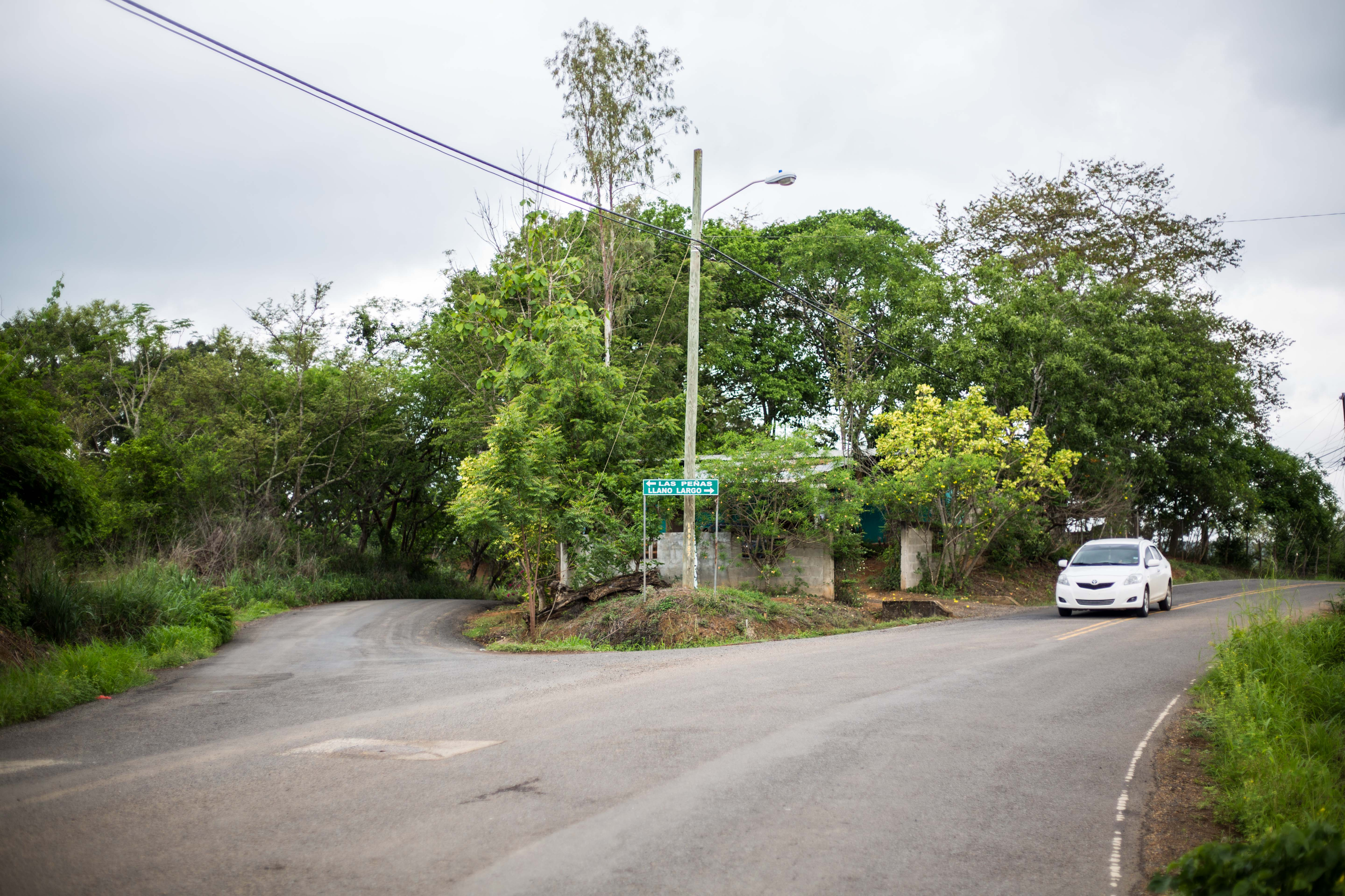 Entrada principal al Corregimiento de Llano Largo. Hacia la izquierda entrada al regimiento de Las Peñas y hacia la derecha entrada al regimiento de Llano Largo.